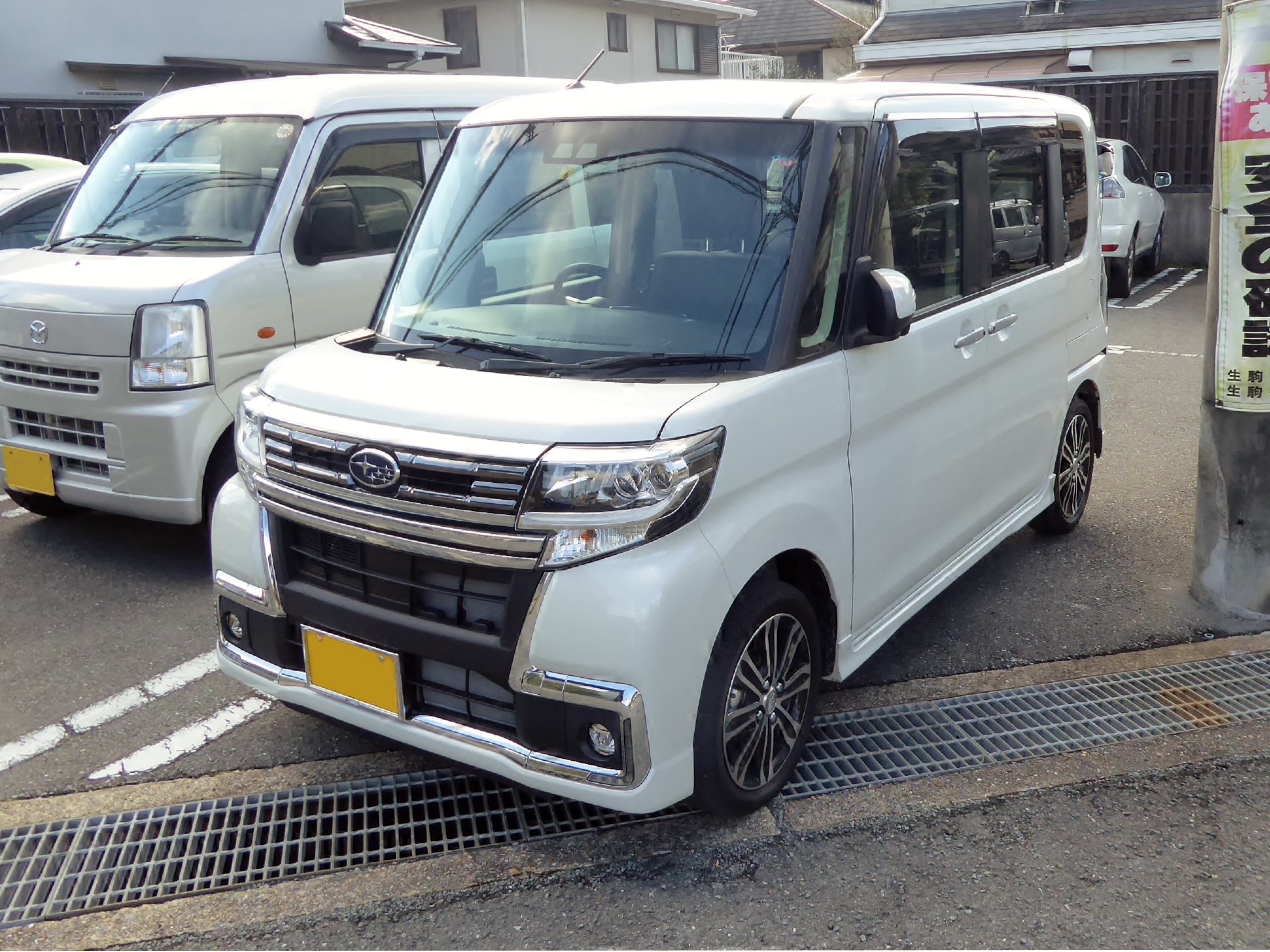 DBA-LA600F型スバル・シフォンカスタムRS Limitedスマートアシストをフロントから撮影。